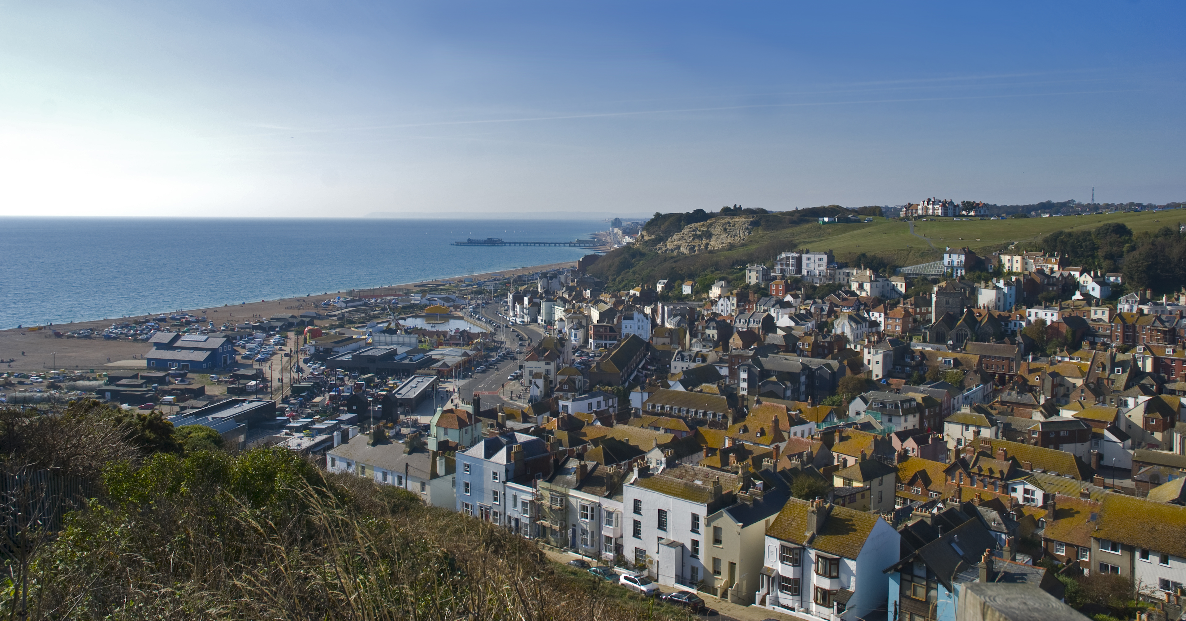 Hastings